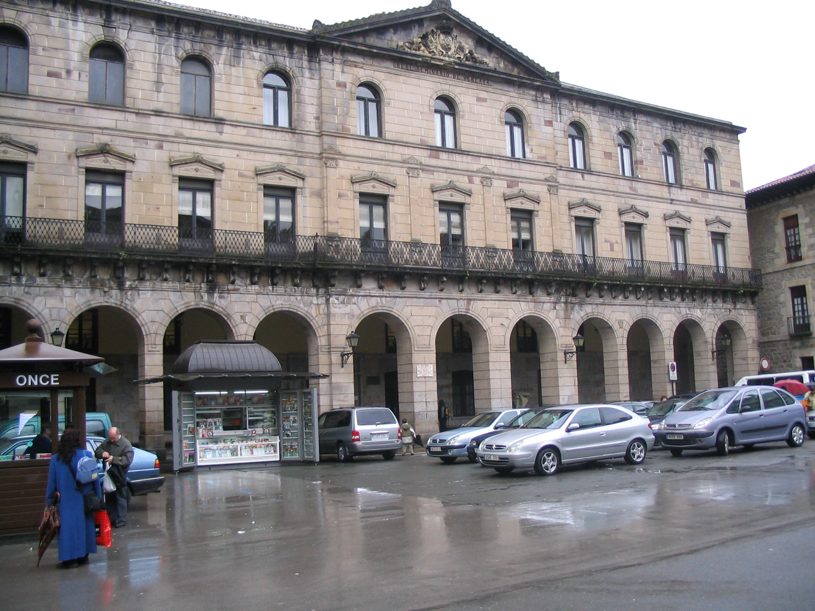 Place de Bergara (Guipuscoa (Pyrénées).